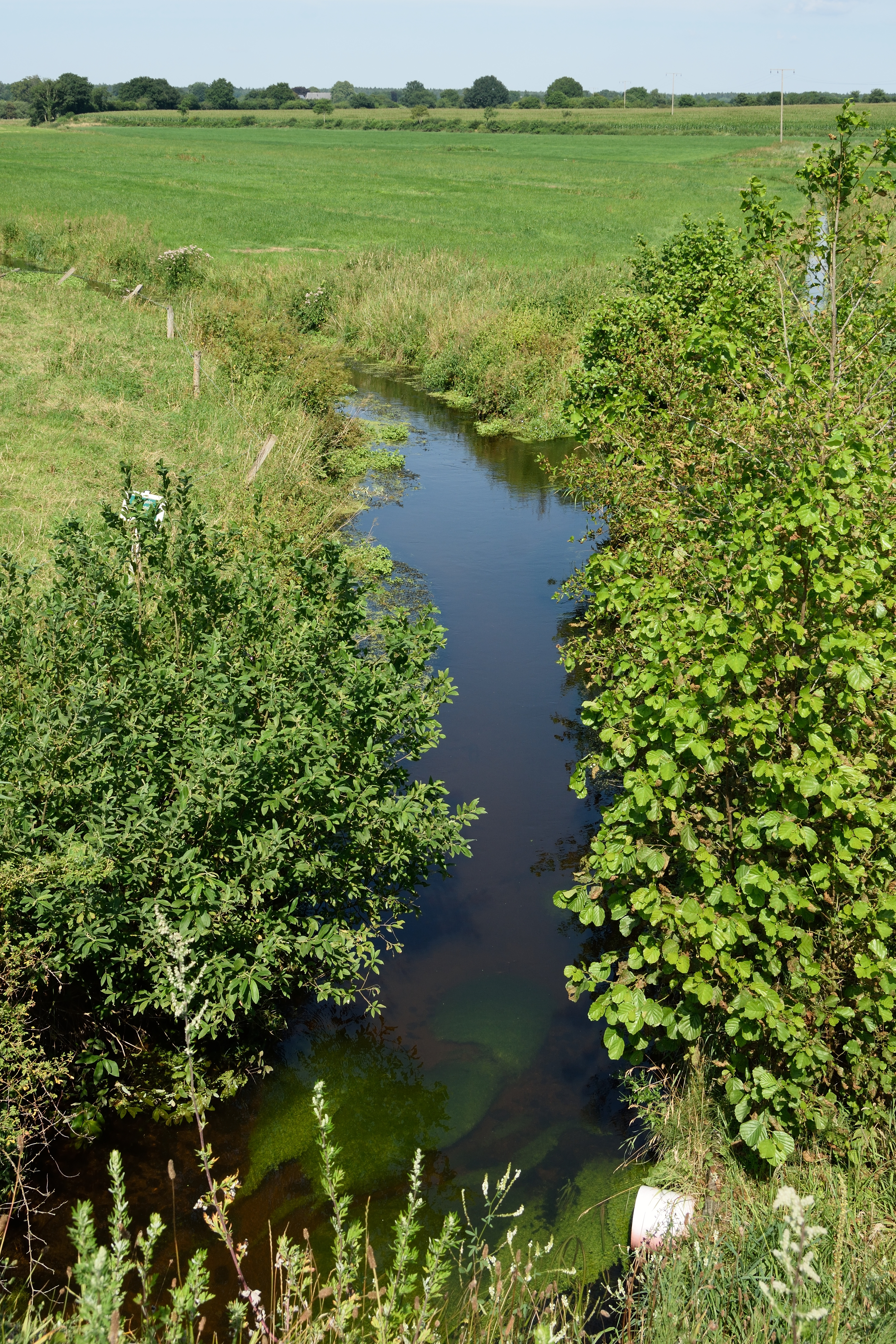 Die Bekau an der Brücke über die Kreisstraße 71 in Drage. Rechts oben der Zufluss "Rolloher Bek"